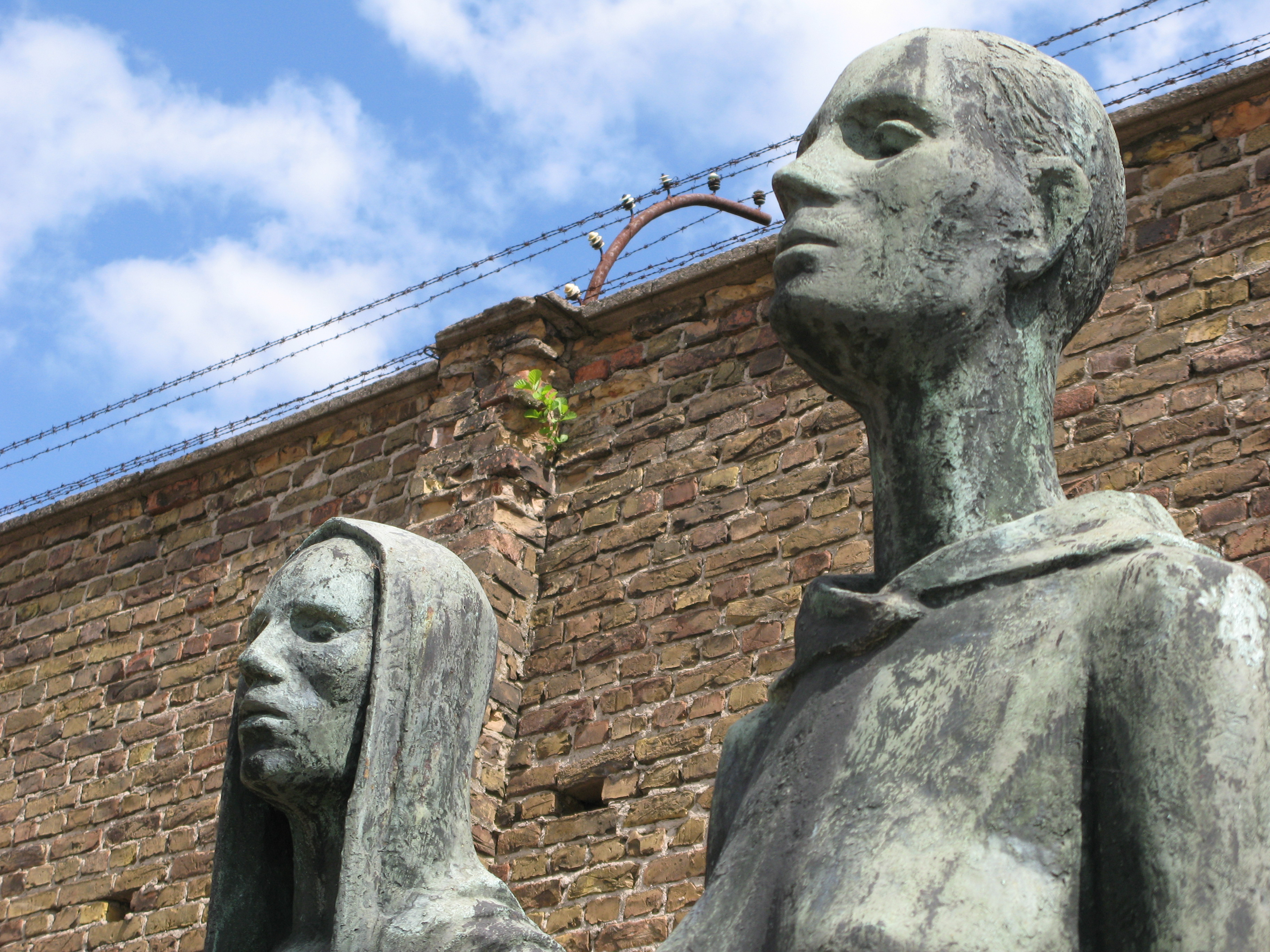 Bronzeplastiken vor der ehemaligen Lagermauer in der Mahn- und Gedenkstätte Ravensbrück im ehemaligen KZ Ravensbrück, Deutschland.